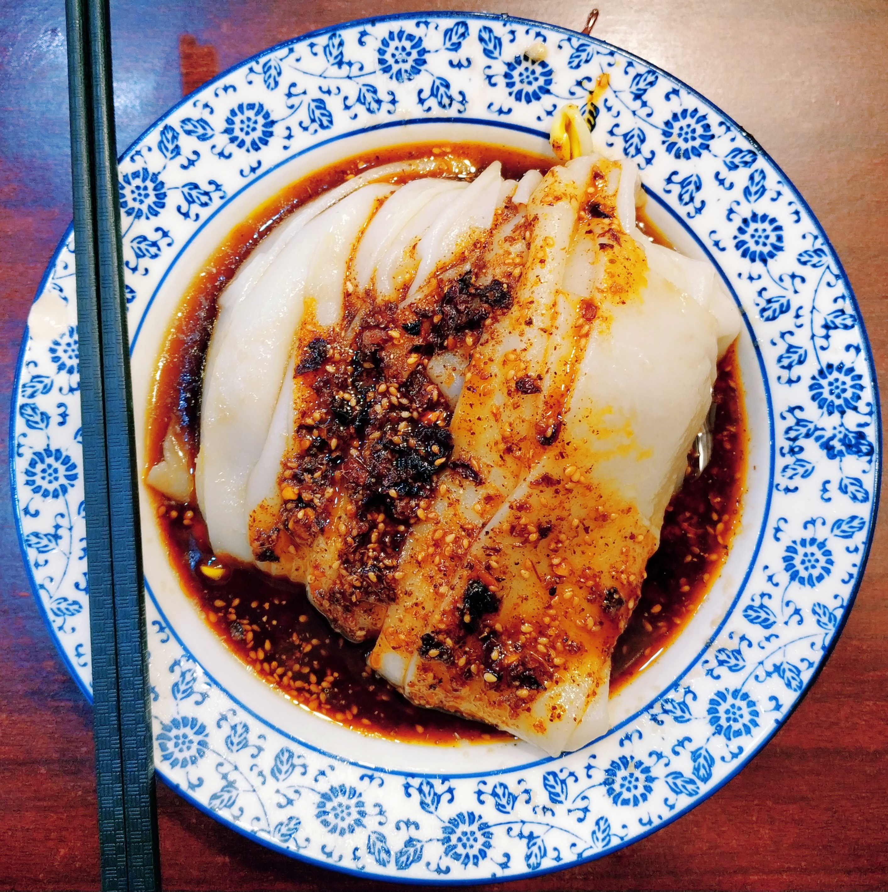 中文（中国大陆）: 汉中名吃面皮